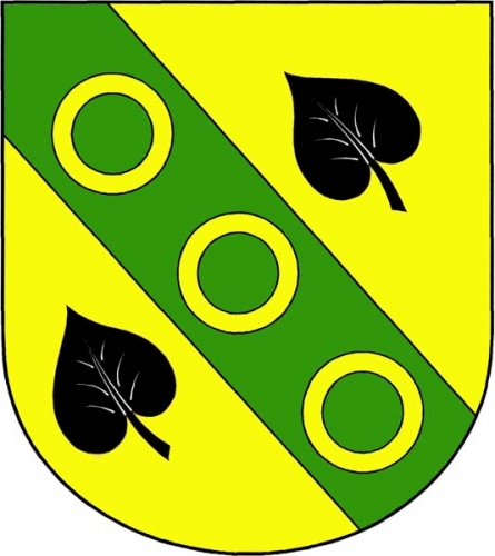 Znak obce Kamenice